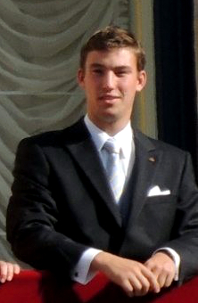 De Prënz Sébastien den Dag vum Bestietnes vu sengem grousse Brudder, dem Ierfgroussherzog Guillaume.